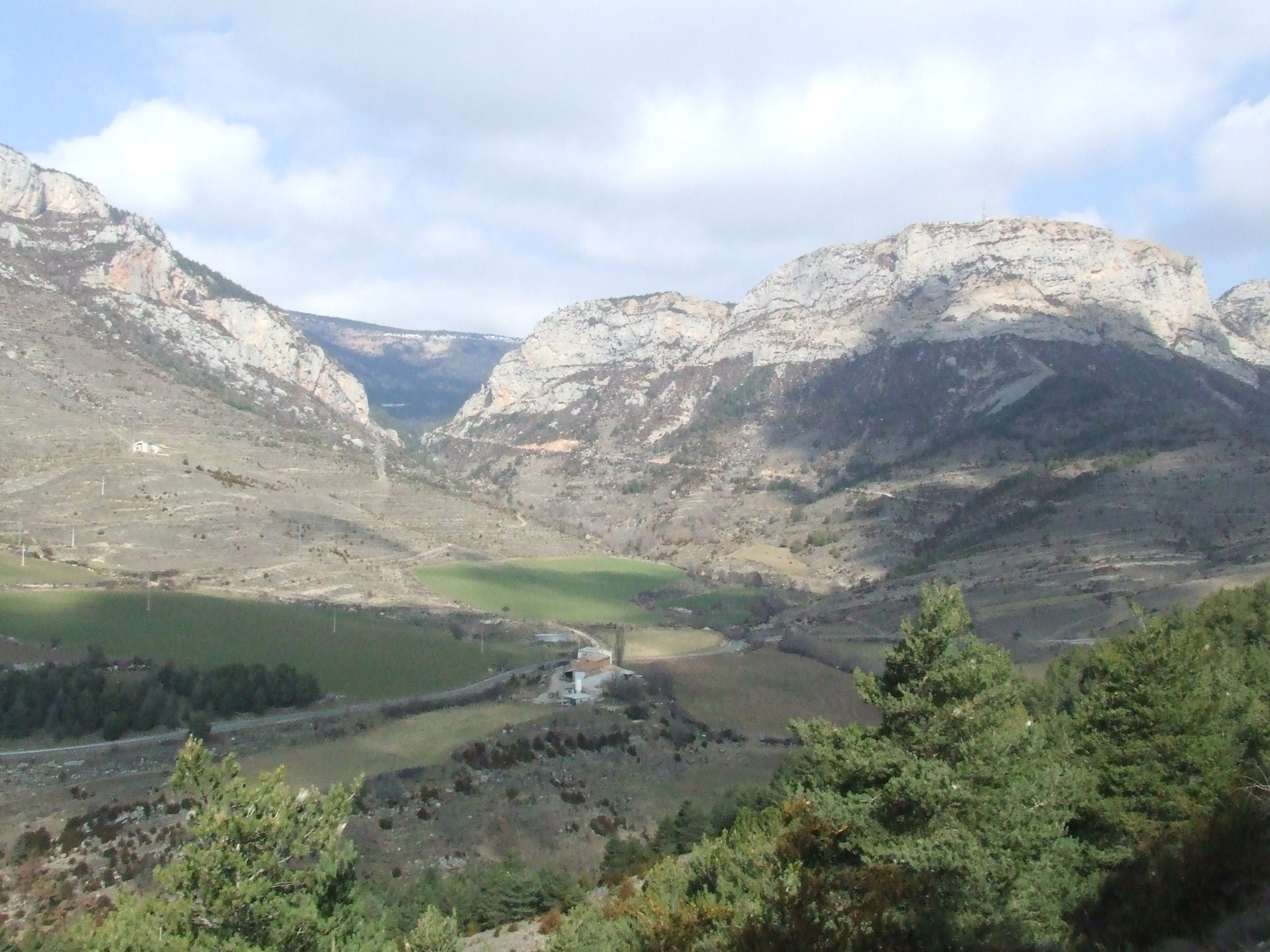 Vall alta del riu de Pujals (Montanissell, Coll de Nargó, Alt Urgell)